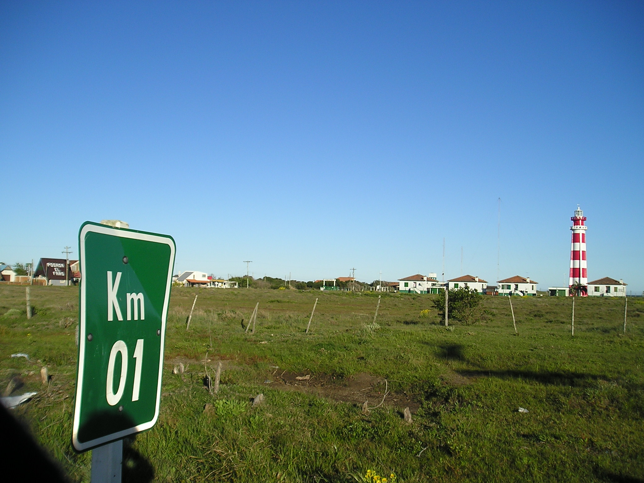 (French) Plaque de marquage kilométrique, sur le territoire municipal de Santa Vitória do Palmar, Rio Grande do Sul, Brésil, à l'entrée depuis l'Uruguay.